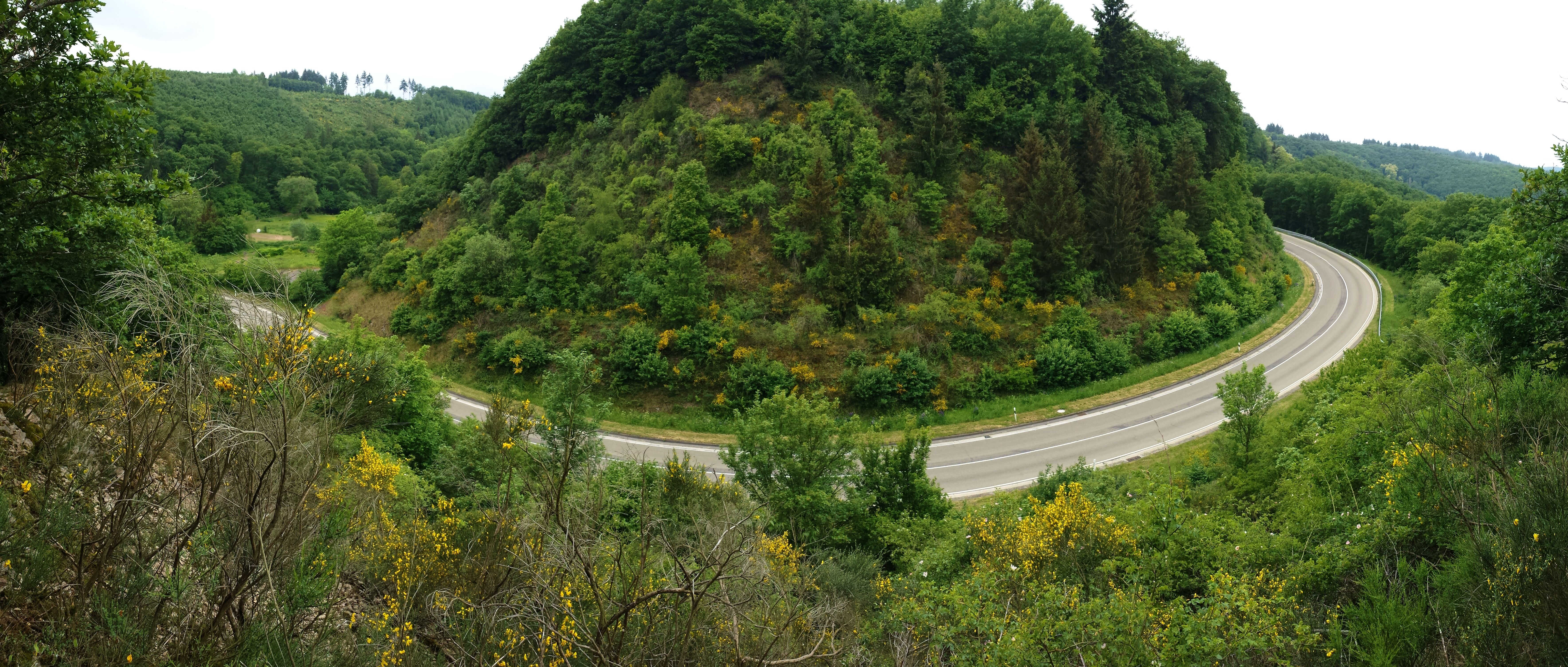 Bundesstraße B259